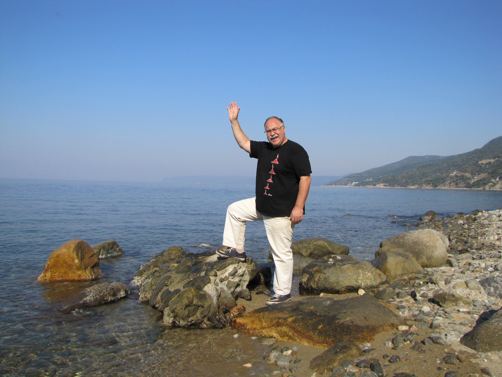 На брега на п-в Атон (Света гора)